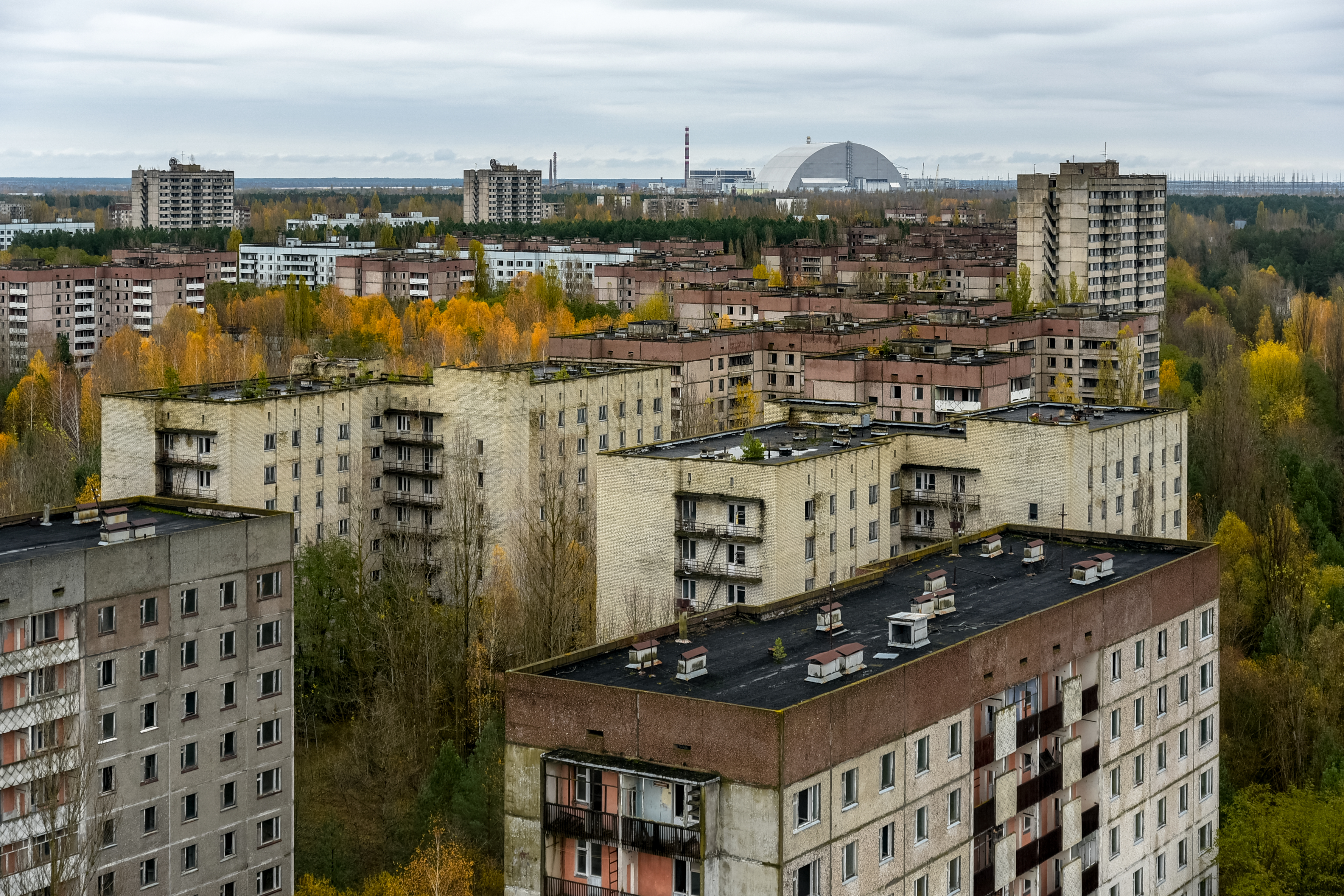 Pripyat (Ukraine)